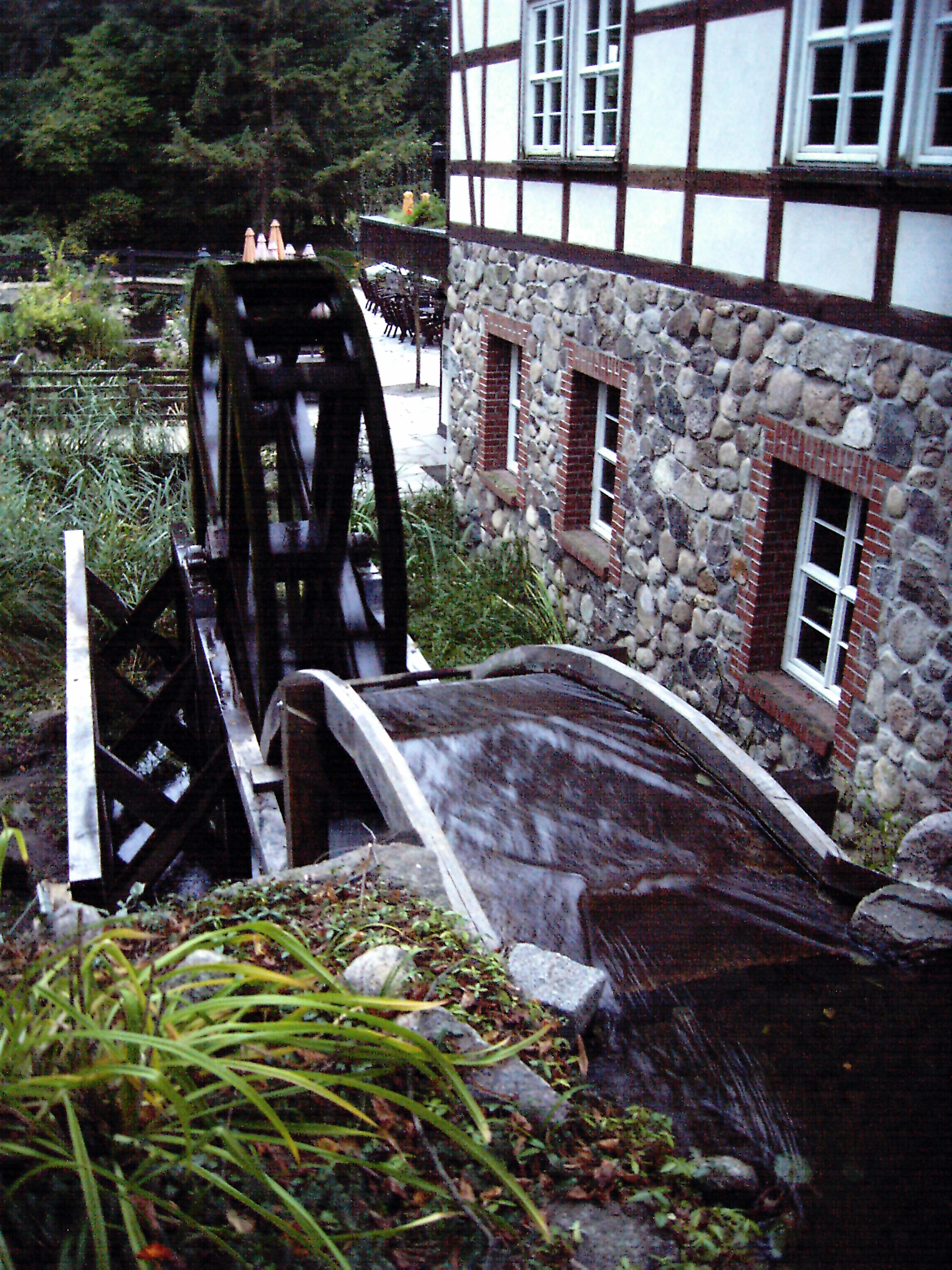 Wasserrad der Boltenmühle, Fontanewanderweg am Tornowsee, Ruppiner Schweiz in Brandenburg